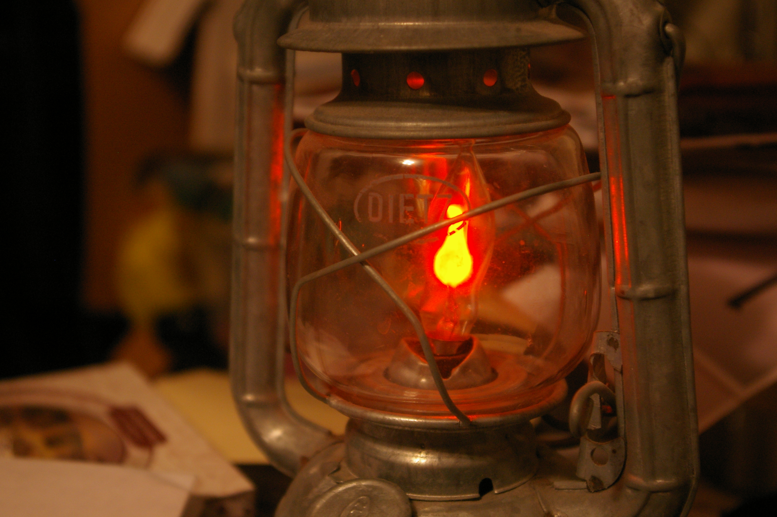 Flackerkerze